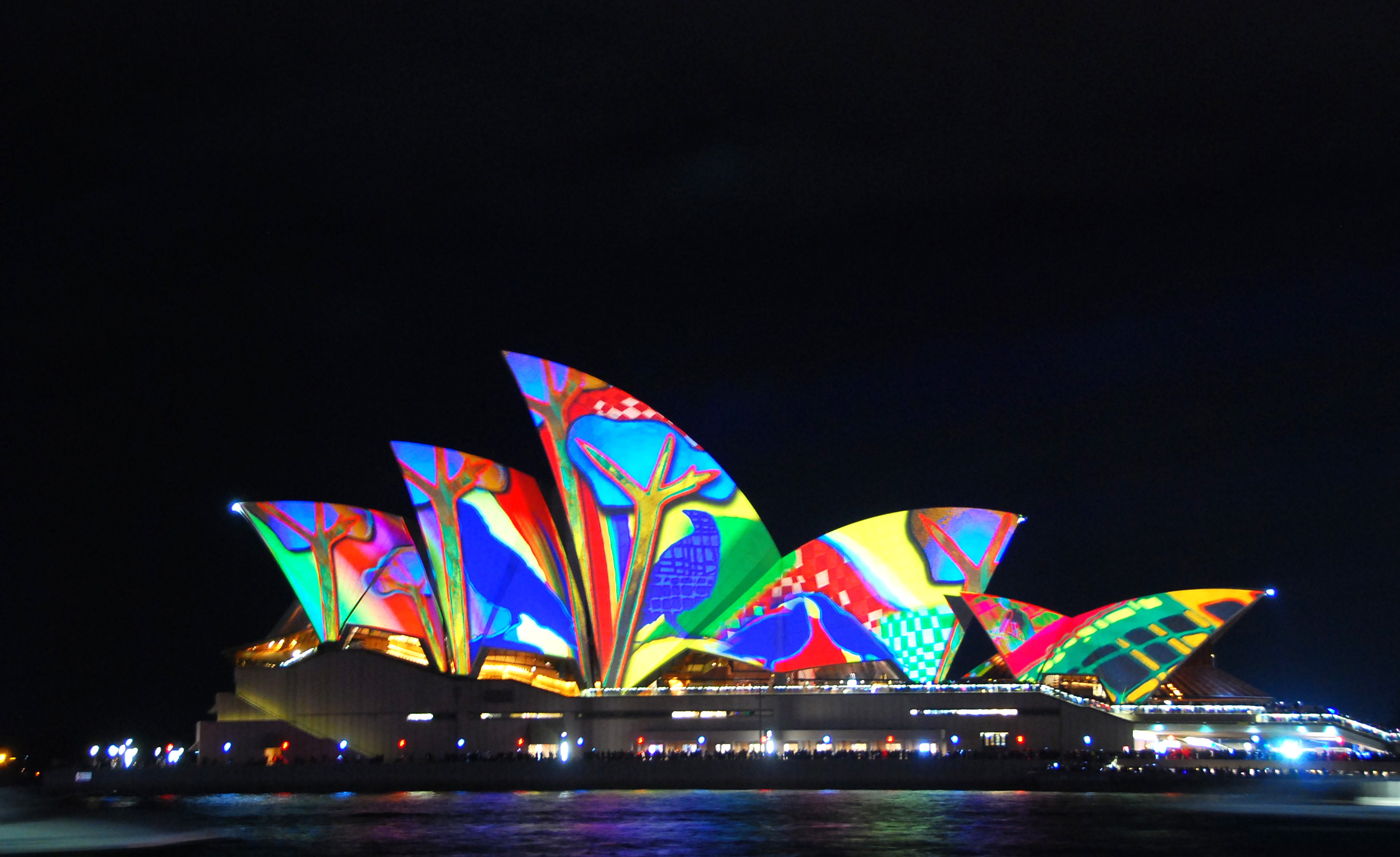 Vivid Festival, 2016